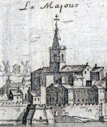 Vue d’Arles en 1660 (détail). Église Notre-Dame-de-la-Major d'Arles.